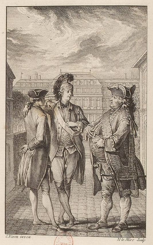 Claude-Joseph Dorat (à gauche) et Alexandre-Frédéric-Jacques Masson de Pezay, en uniforme de dragon (au centre)